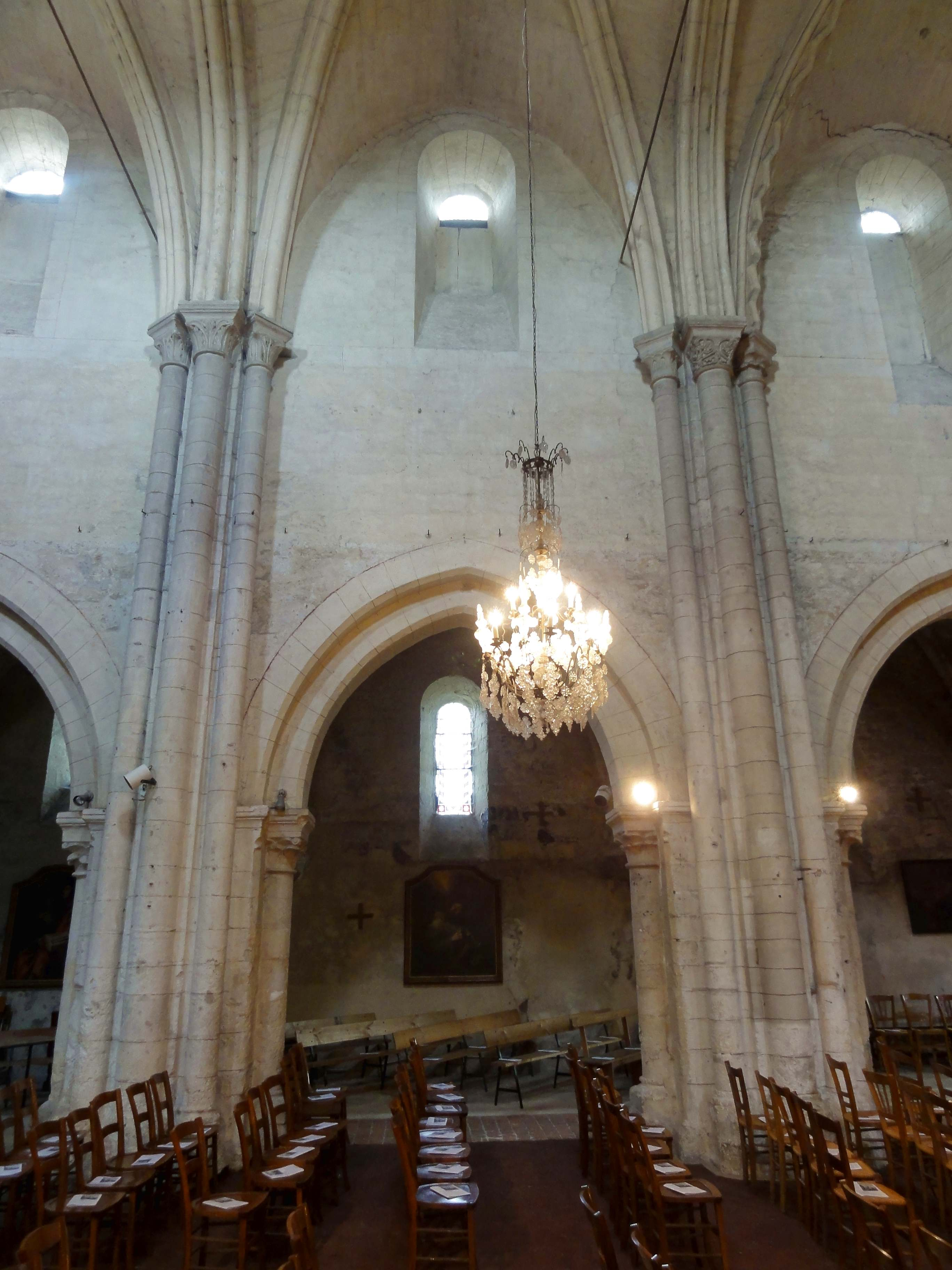 Intérieur de l'église Saint-Pierre-et-Saint-Paul (voir titre).